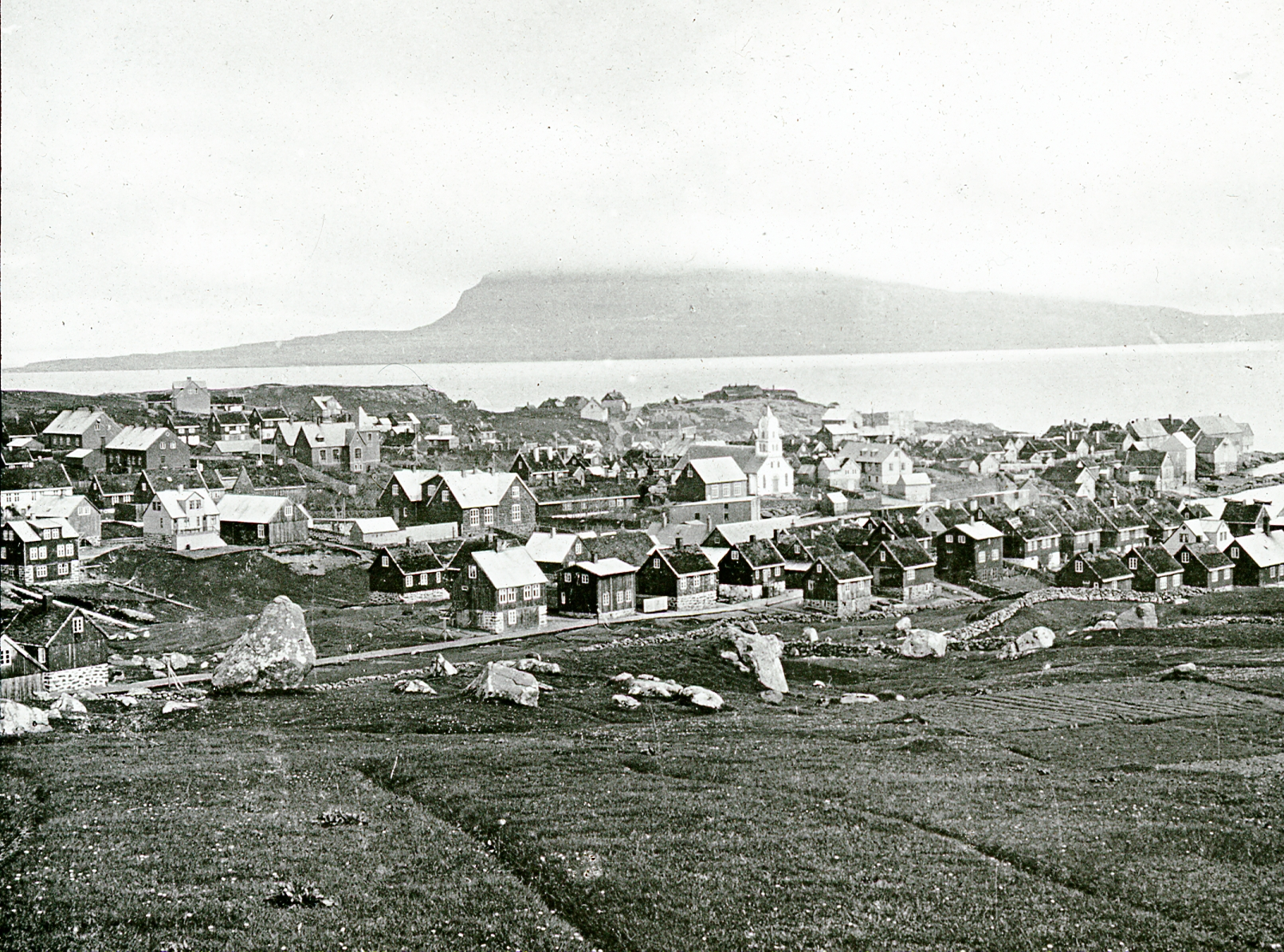 Del af lysbilledeserie benævnt "Færøerne" i trææske. I æsken indlagt liste over de 57 lysbilleder, æsken indeholder. Titel fra fotolisten. I æsken forefindes et løst maskinskrevet foredragsmanuskript, der ikke er signeret. Lysbillede indkommet via Orø Museer, 2016. Lysbillederne stammer fra firmaet V. Richter.